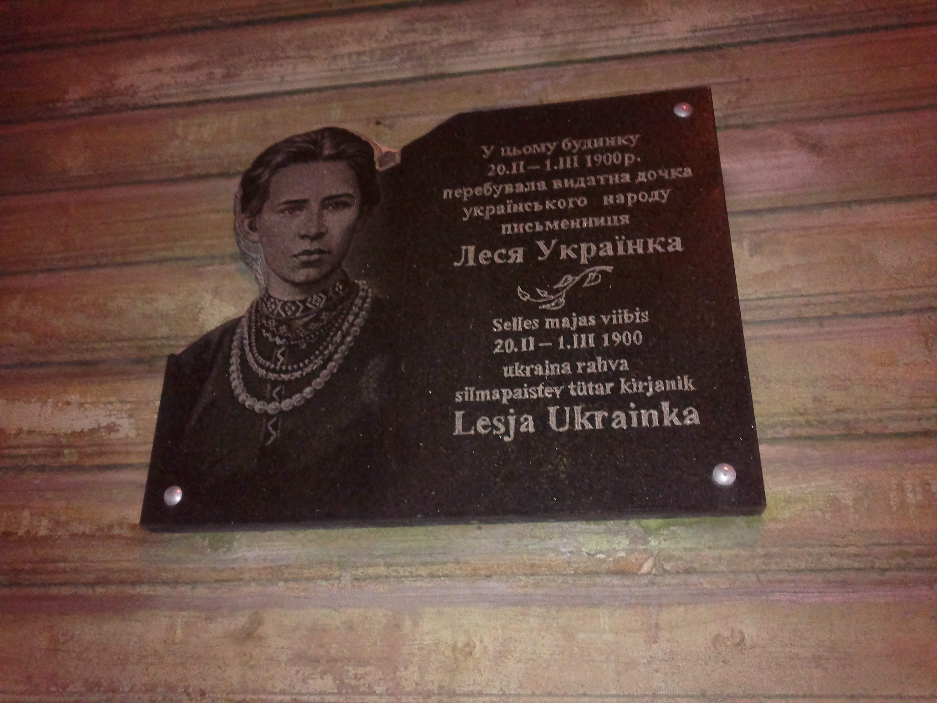 Lesja Ukrajinka mälestustahvel Tartus Kastani 65 majal